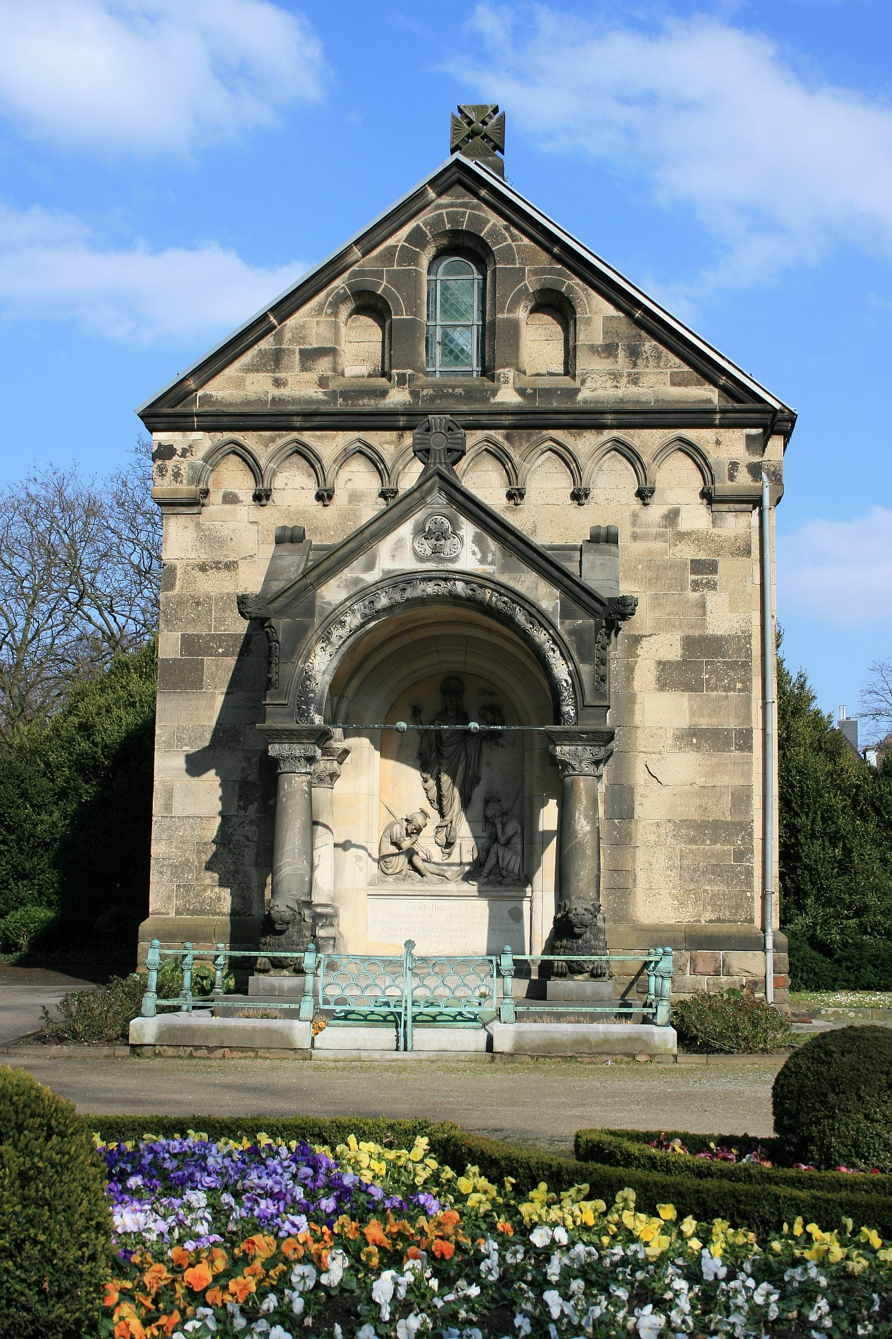 Krypta des Ostfriedhofs in Aachen